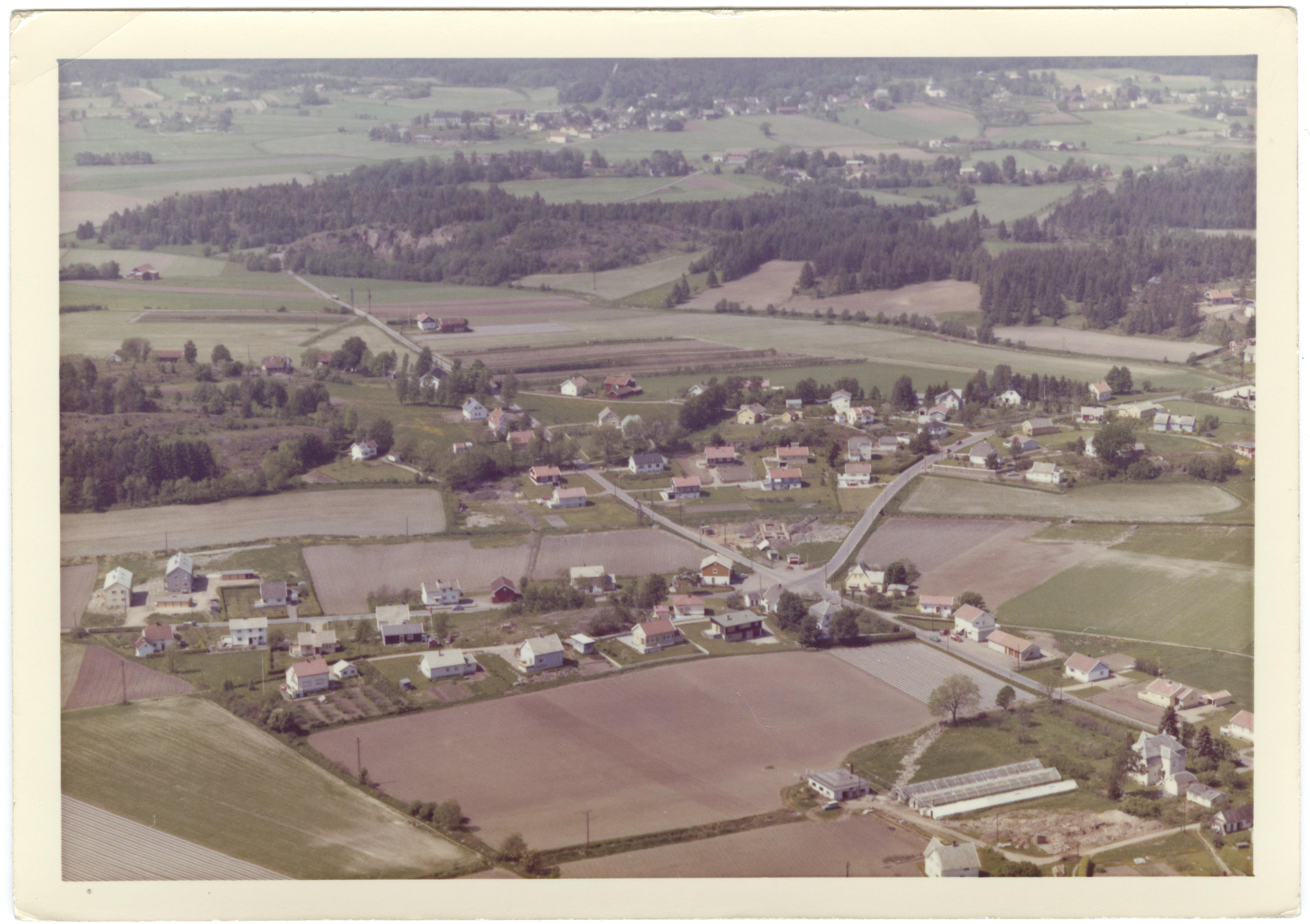 WF.S.164946